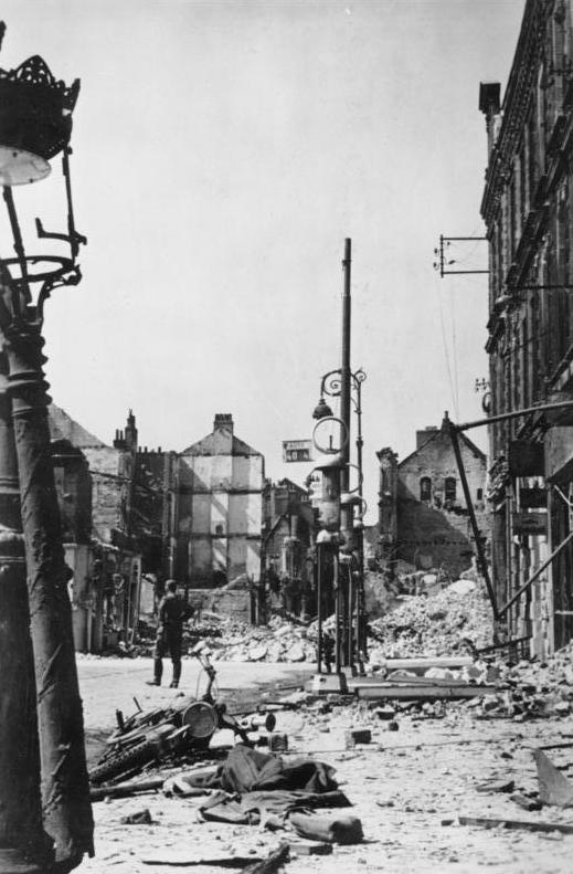 Calais, beschädigte Gebäude Scherl: Calais bekam die Wirkung deutscher Geschütze zu spüren. Juni 1940 PK: Ege